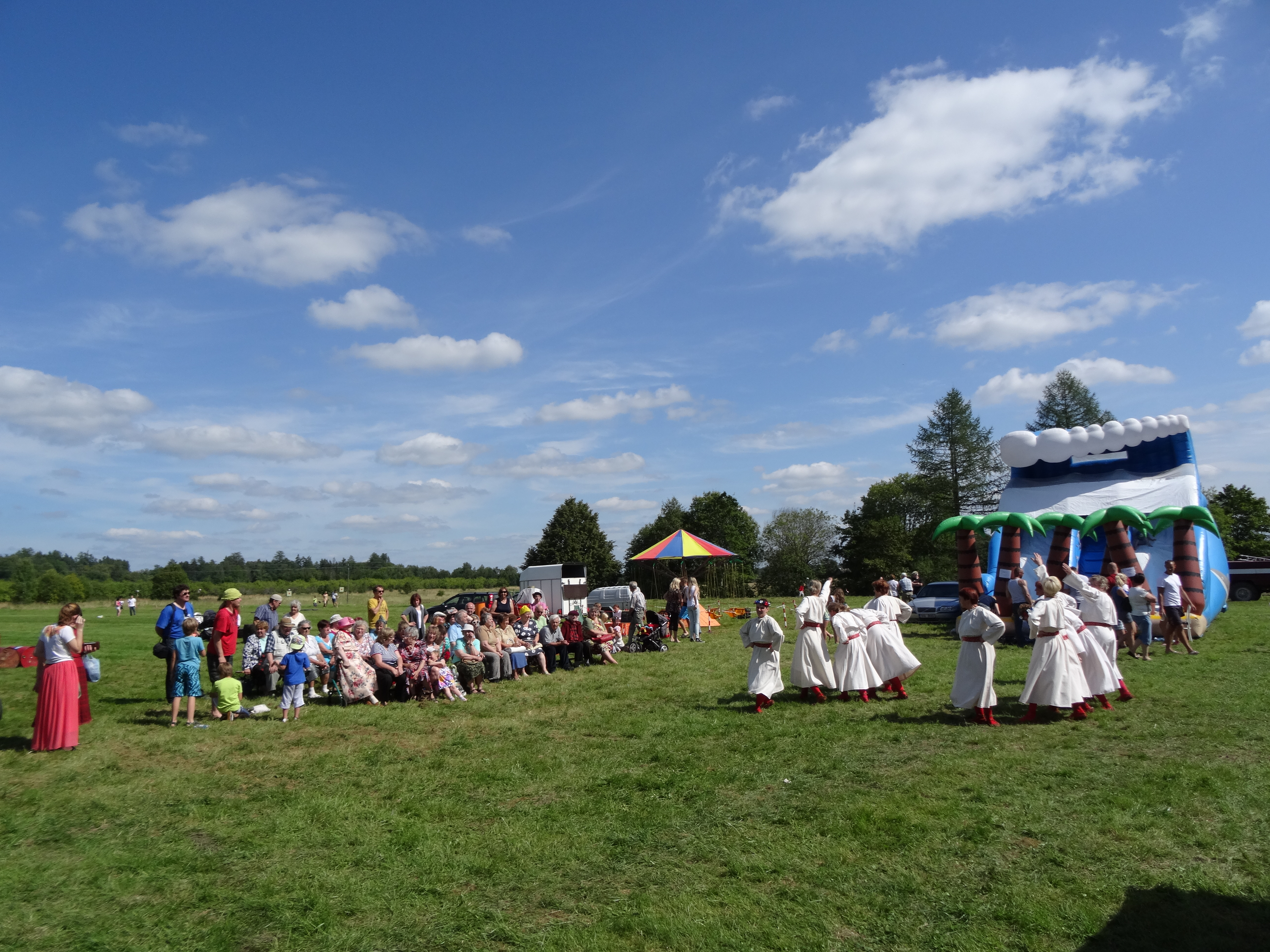 Rahvatants Poti laadal (2015)